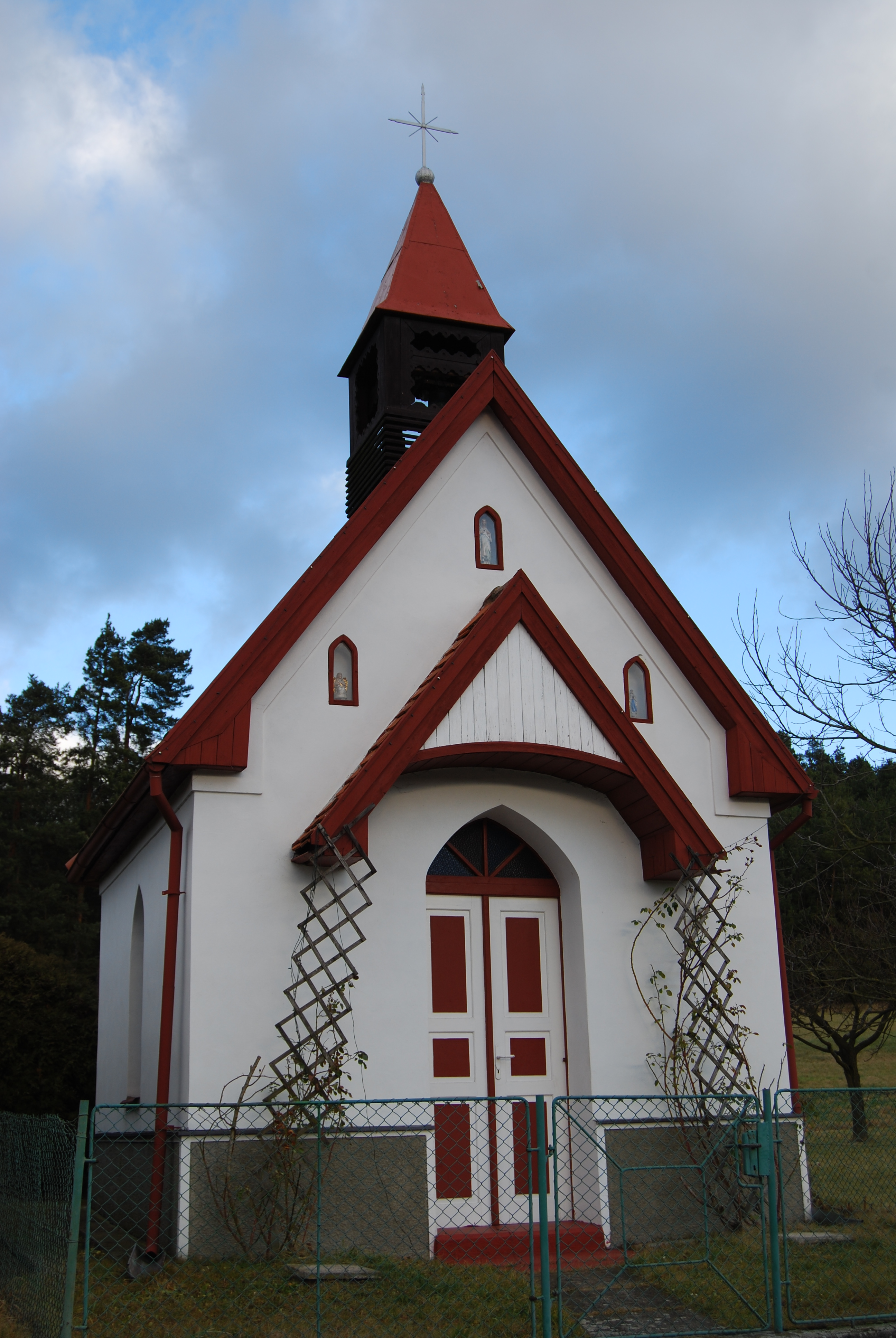 Kaple v obci. Rastory (Podolí I. ) Okres Písek. Česká republika.